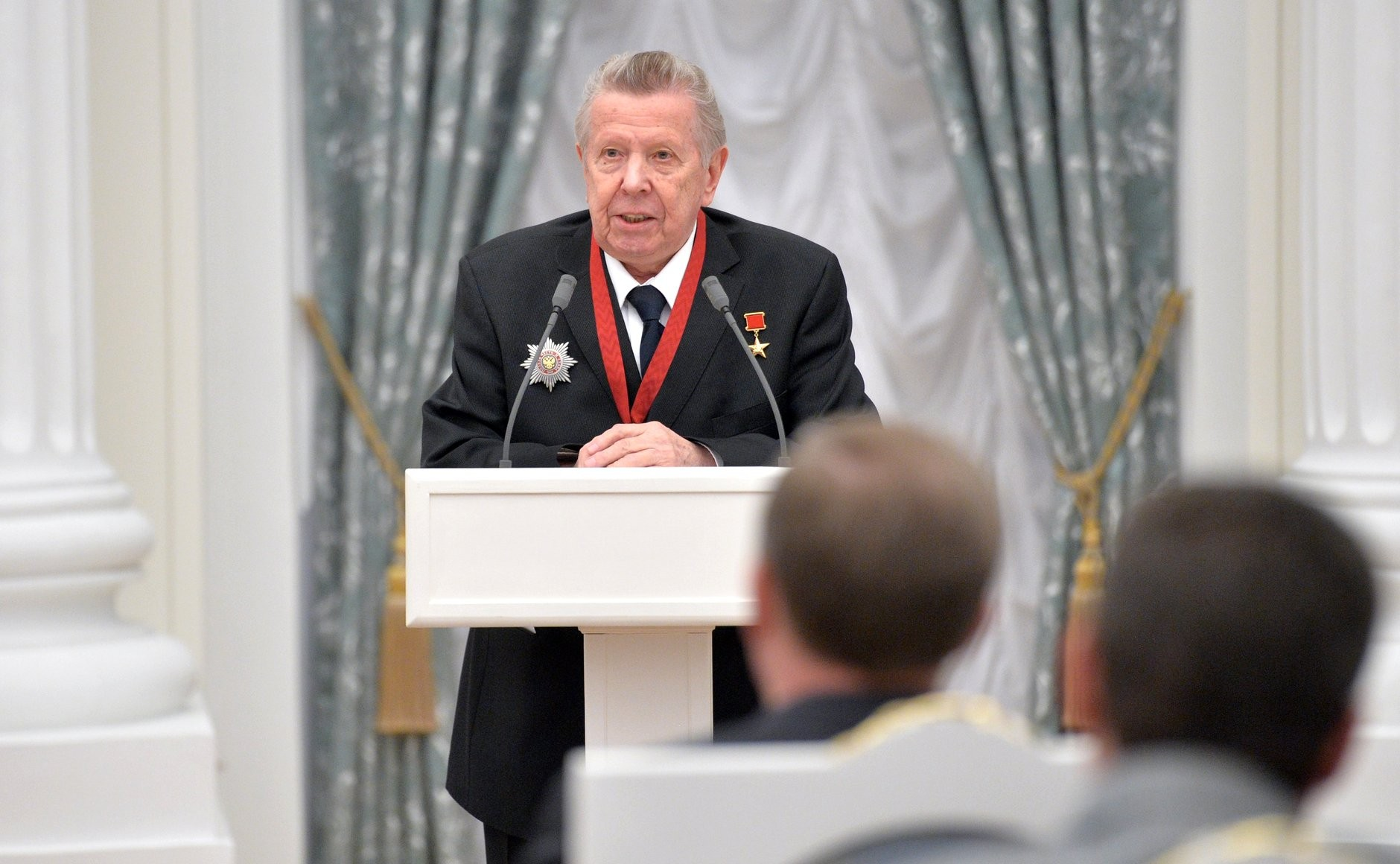 Церемония вручения государственных наград Российской Федерации